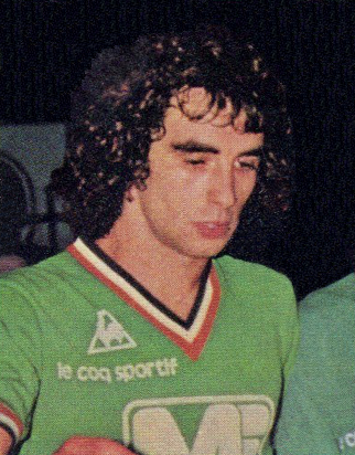 Dominique Rocheteau (1978), 'Eurofootball 1978 - 1979', Panini figurina n°104.